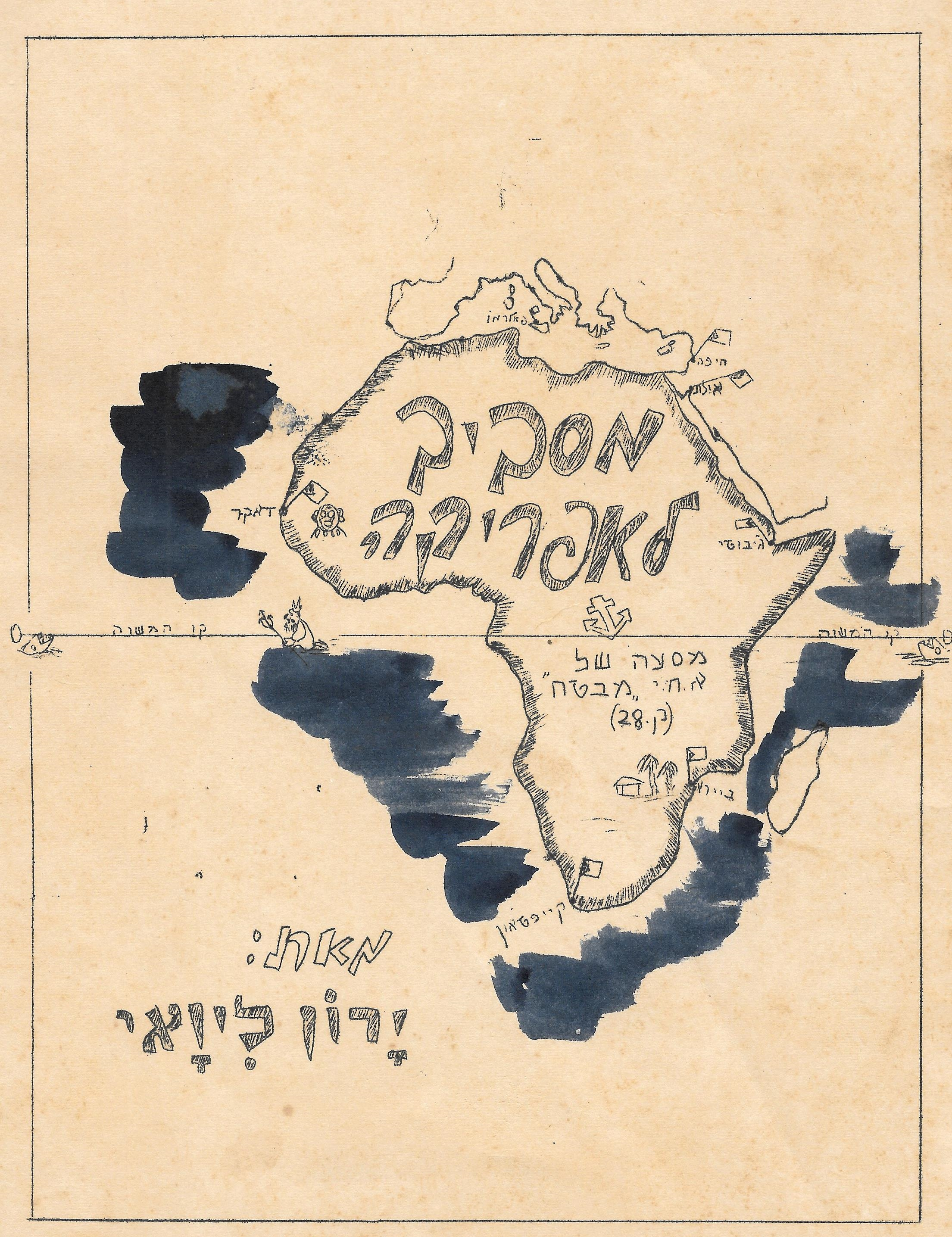 תרשים המסע סביב אפריקה של אח"י מבטח (ק-28) דצמבר 1956